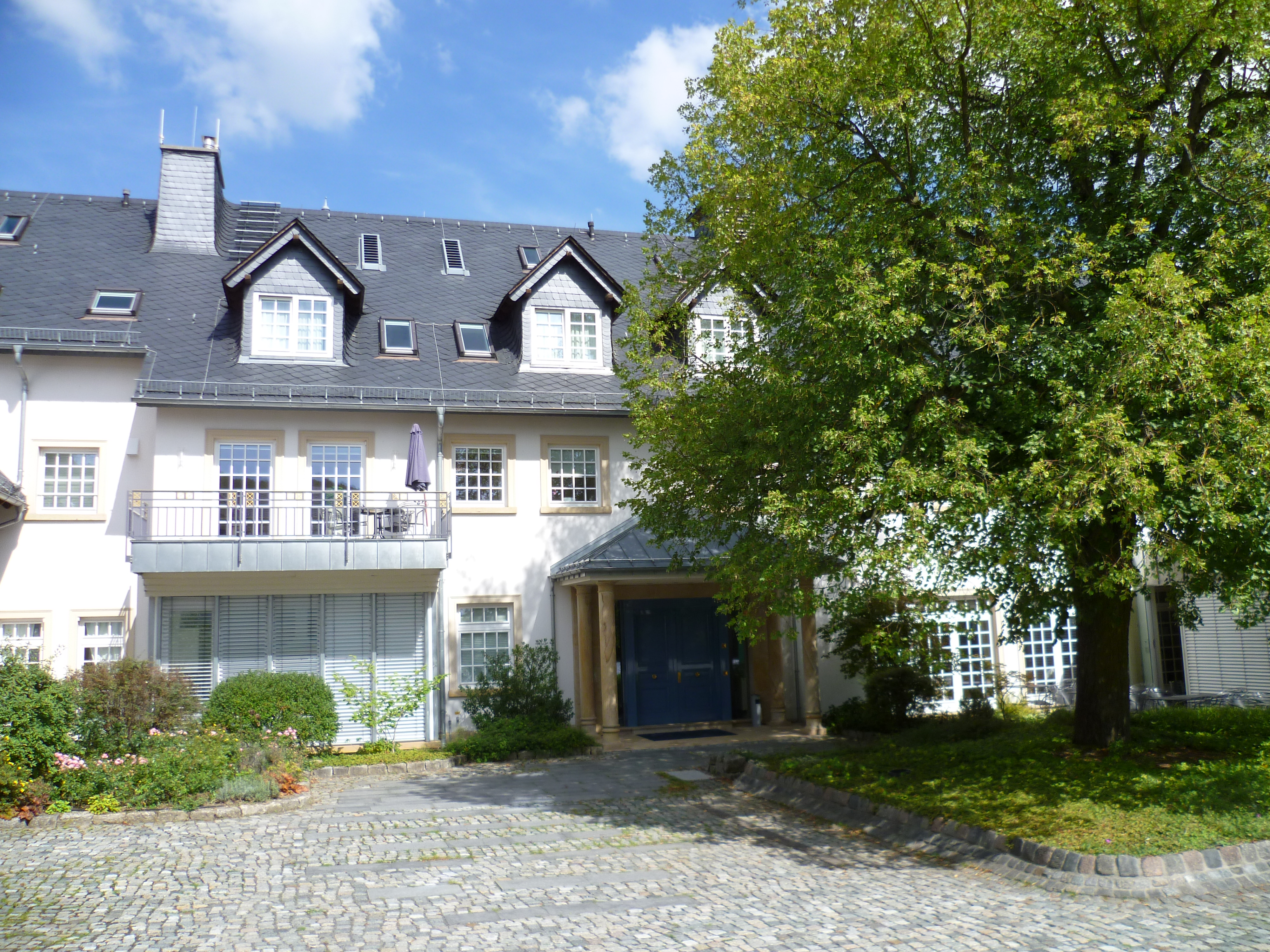 Innenaufnahme am Hofgut Georgenthal